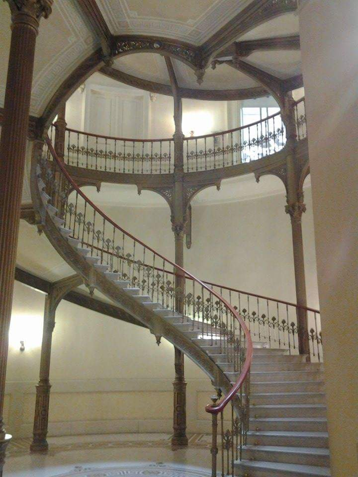 A Budapest Belváros, Károlyi utca 12. alatt látható Ybl-palota lépcsőháza